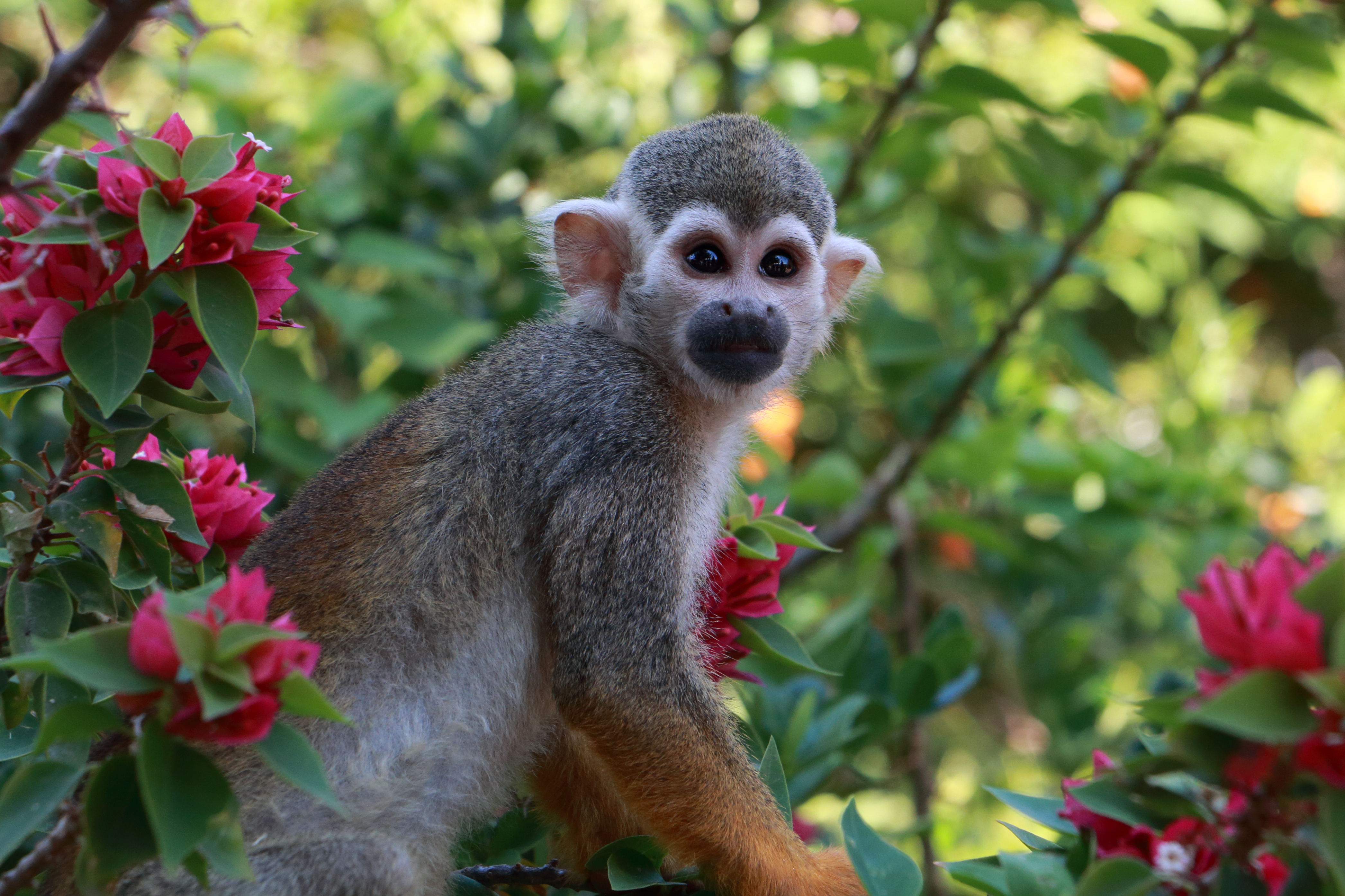 Саймири в парке Акофим, Израиль